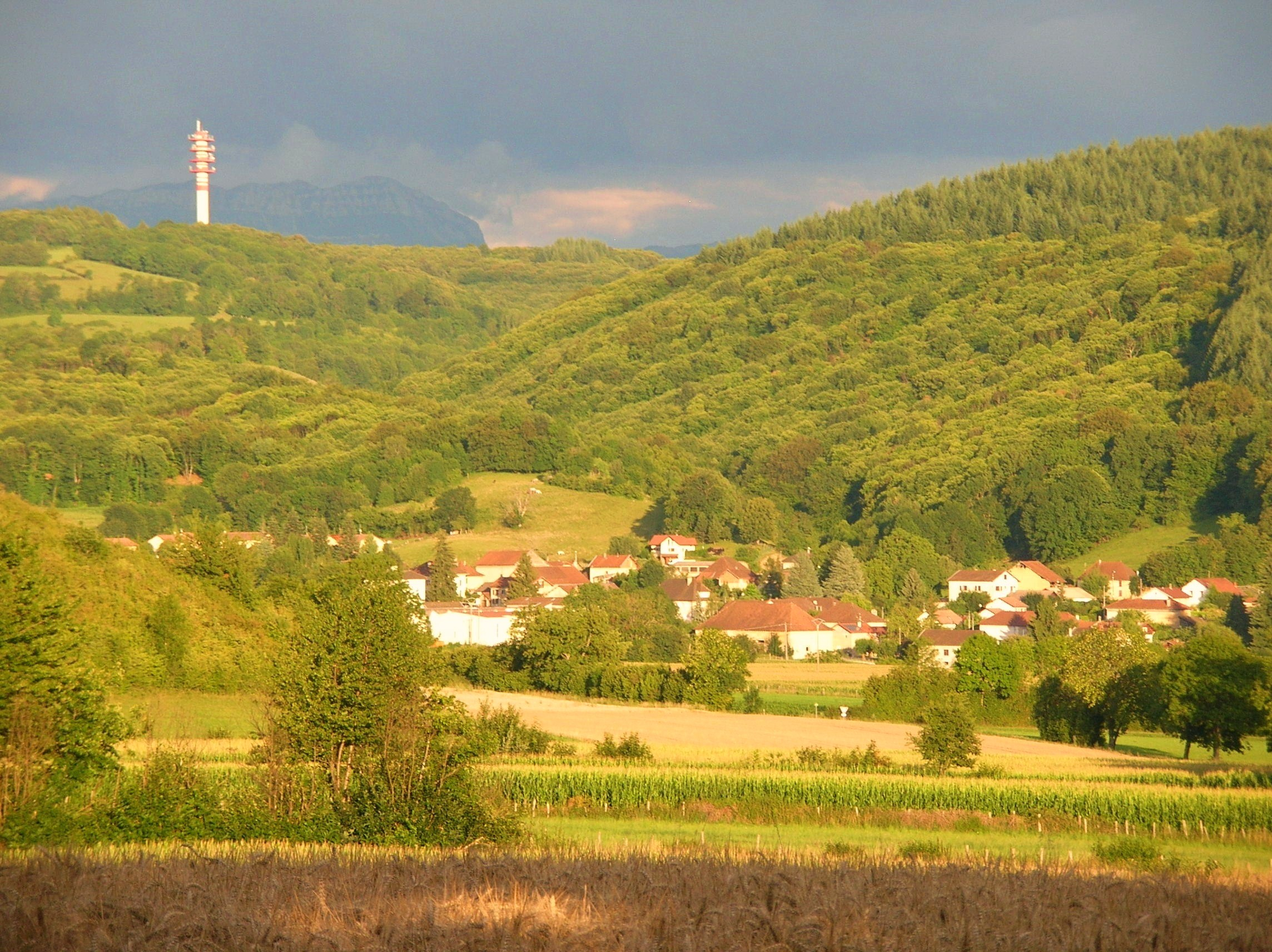 Le Bourg est entouré au Sud par les hautes collines du Levatel et de Montchardon. On aperçoit la tour hertzienne au loin.